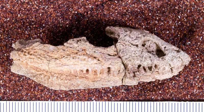 Phonerpeton pricei Olson